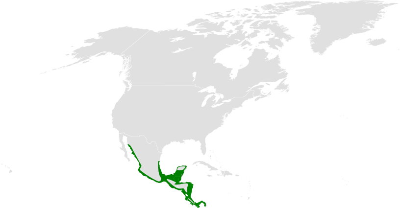 Tachycineta albilinea distribution map, based on